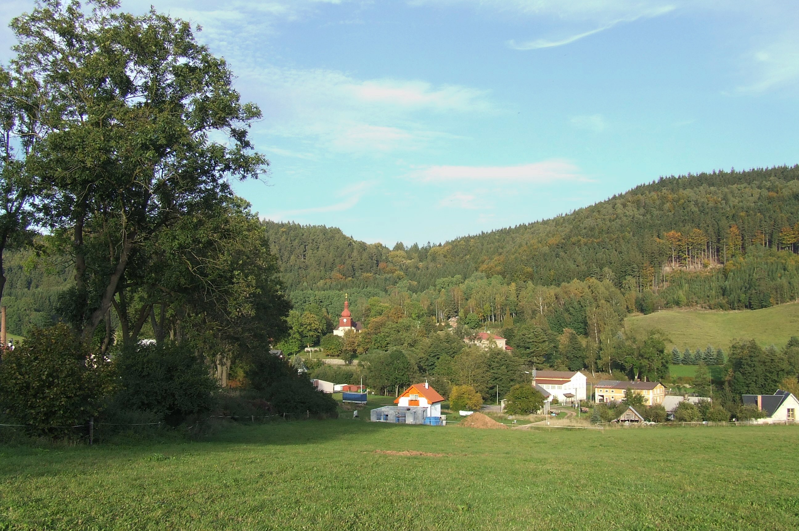 Jívka - Horní Verneřovice celkový pohled na střed obce